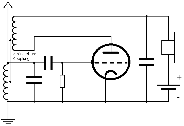 Audion mit Rückkopplung